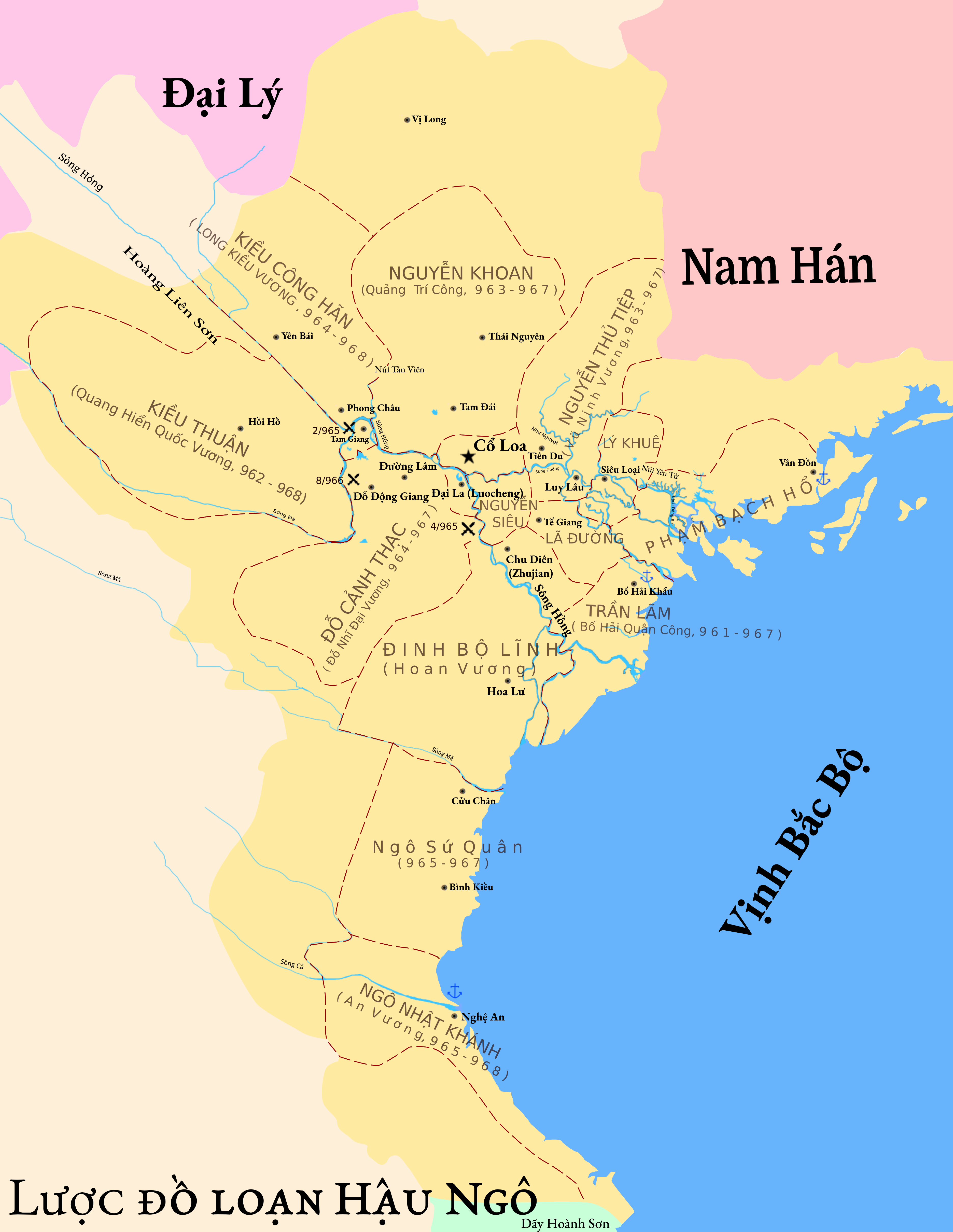 Lược đồ các sứ quân. Loạn 12 sứ quân là một thời kỳ lịch sử loạn lạc, đầy biến động và nội chiến giữa các sứ quân trong hòan cảnh buổi đầu độc lập và tự chủ của người Việt (954-968).